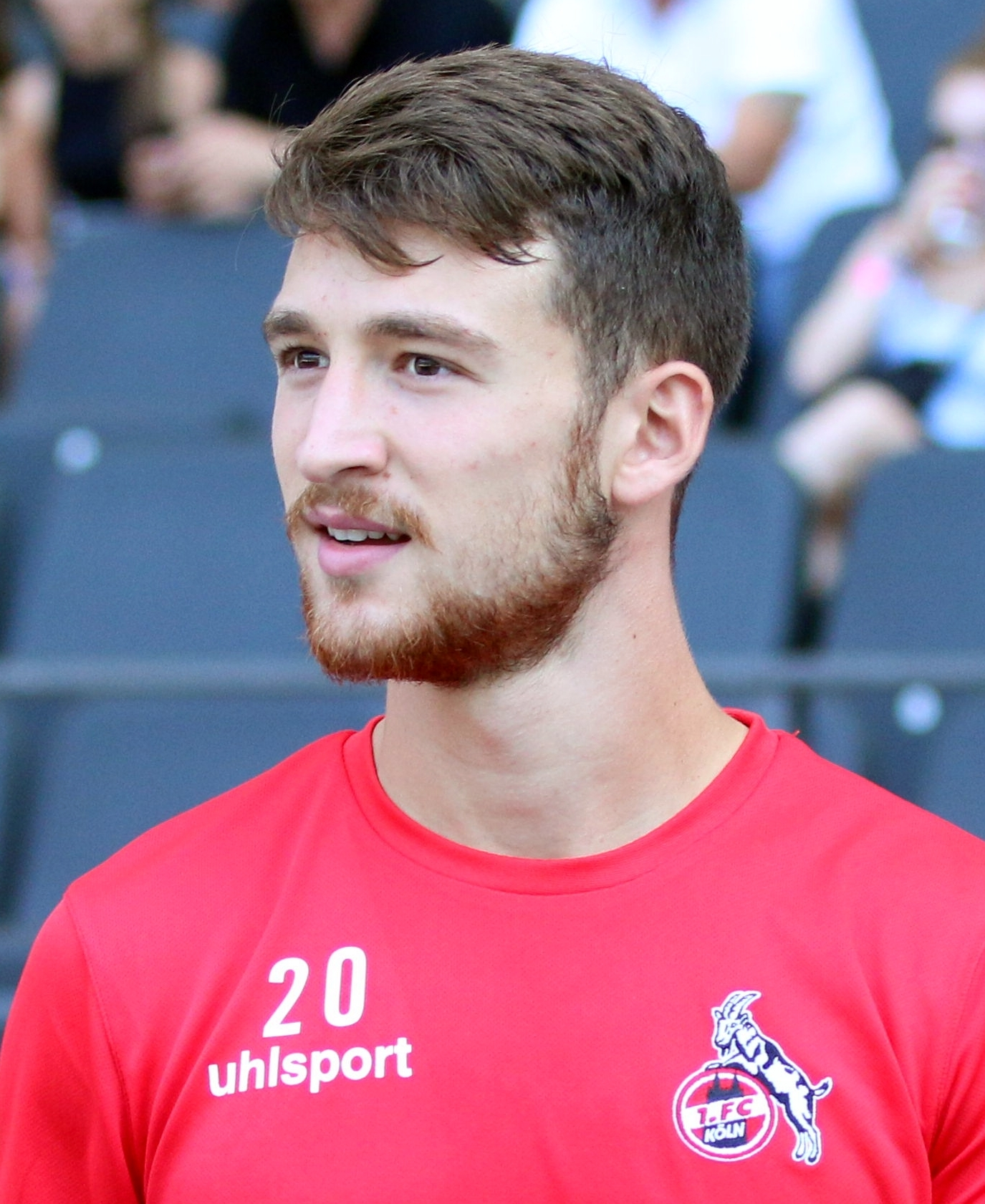 DFB-Pokal 2018/19, 1. Hauptrunde: BFC Dynamo gegen 1. FC Köln 1:9 (1:4): Salih Özcan